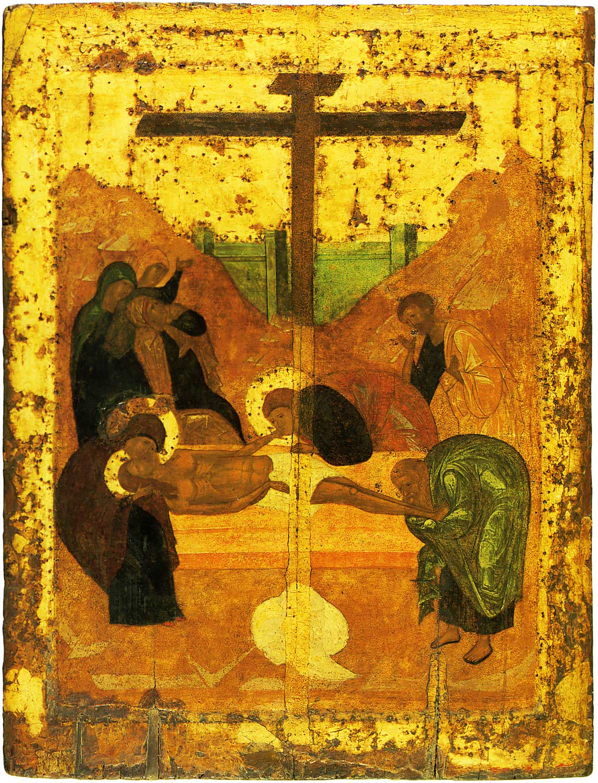 Положение во гроб Из праздничного чина Мастерская Андрея Рублева Школа или худ. центр: Москва 1425–1427 гг. 88 × 68 см Троицкий собор Свято-Троицкой Сергиевой Лавры, Сергиев Посад, Россия Инв. 3053 Из праздничного ряда собора.